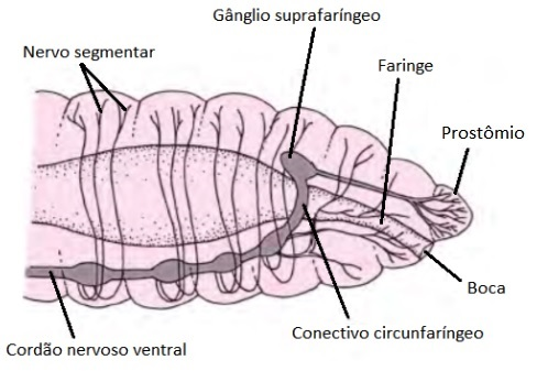 sistema nervoso de minhoca